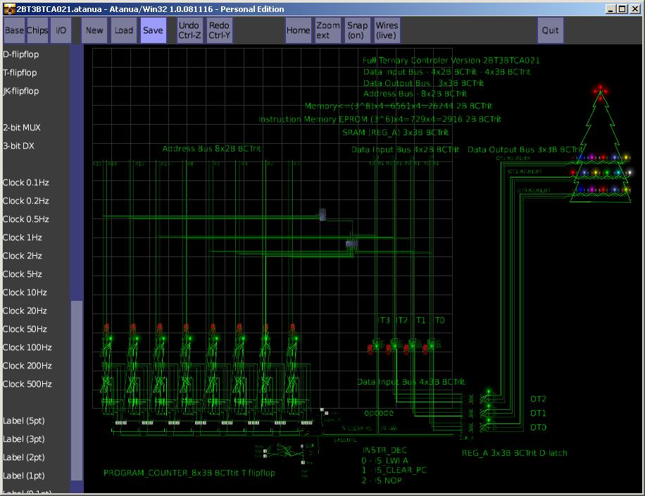 Снимок модели троичного контроллера 2BT3BTCA021 в логическом симуляторе Atanua.